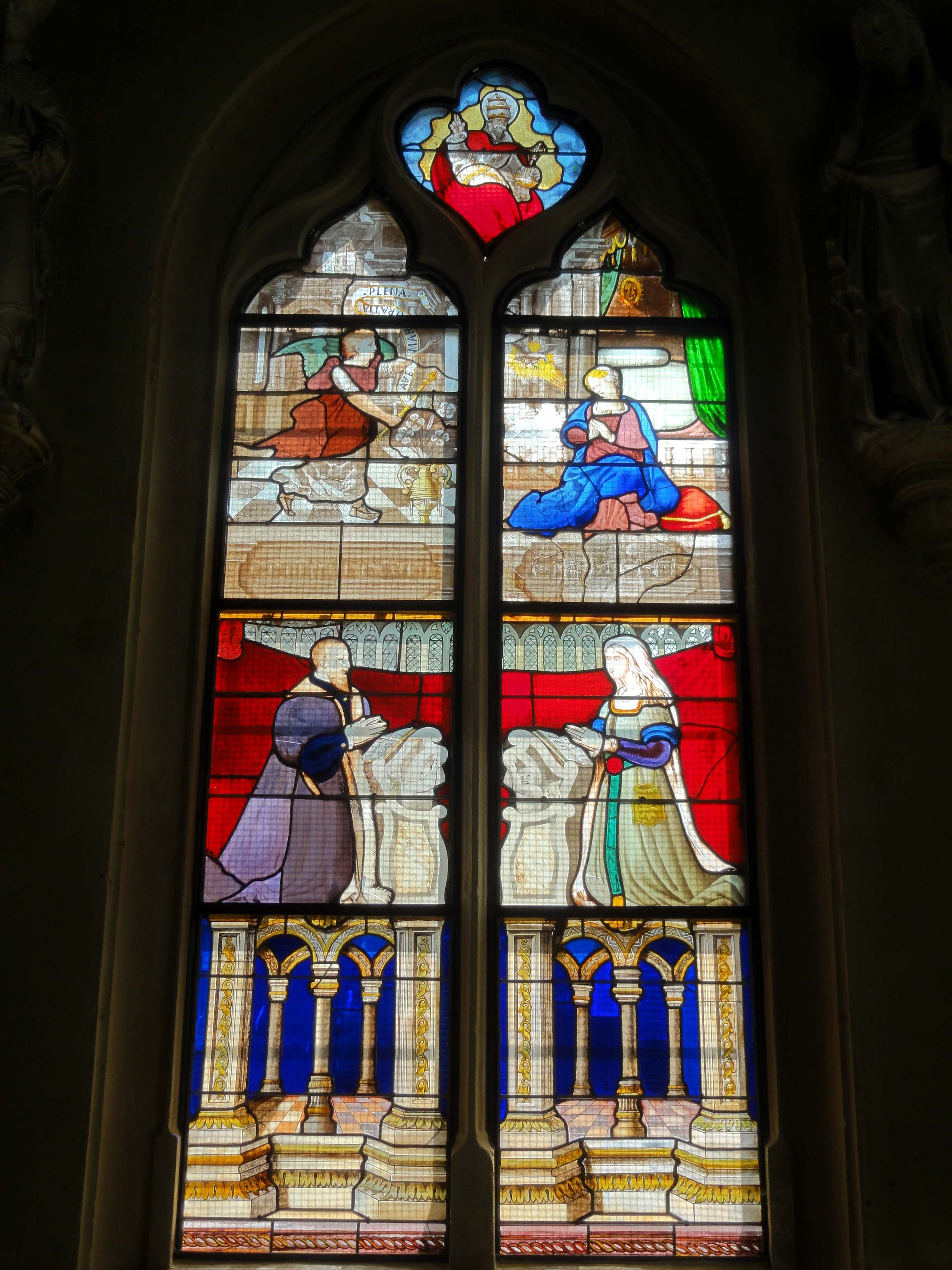 Vitrail n° 0 (axe du chevet), l'Annonciation. Date : vers 1540, restauré en 2014 par V. Jaillette.